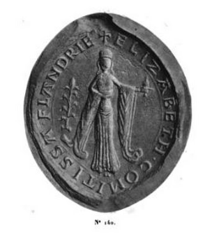 Alžběta z Vermandois